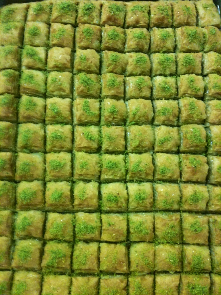 Bu gaziantep fıstıkları ile tereyağın harika lezzetinin ve ustalığın birleşerek meydana gelen milli tatlımız BAKLAVA